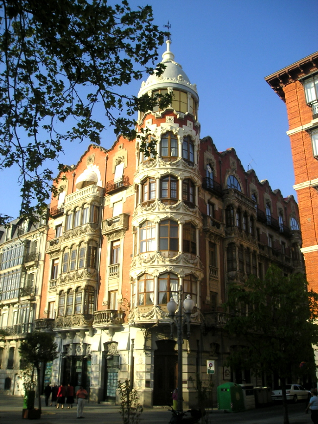 Casa del Príncipe. Vista del torreón y la fachada